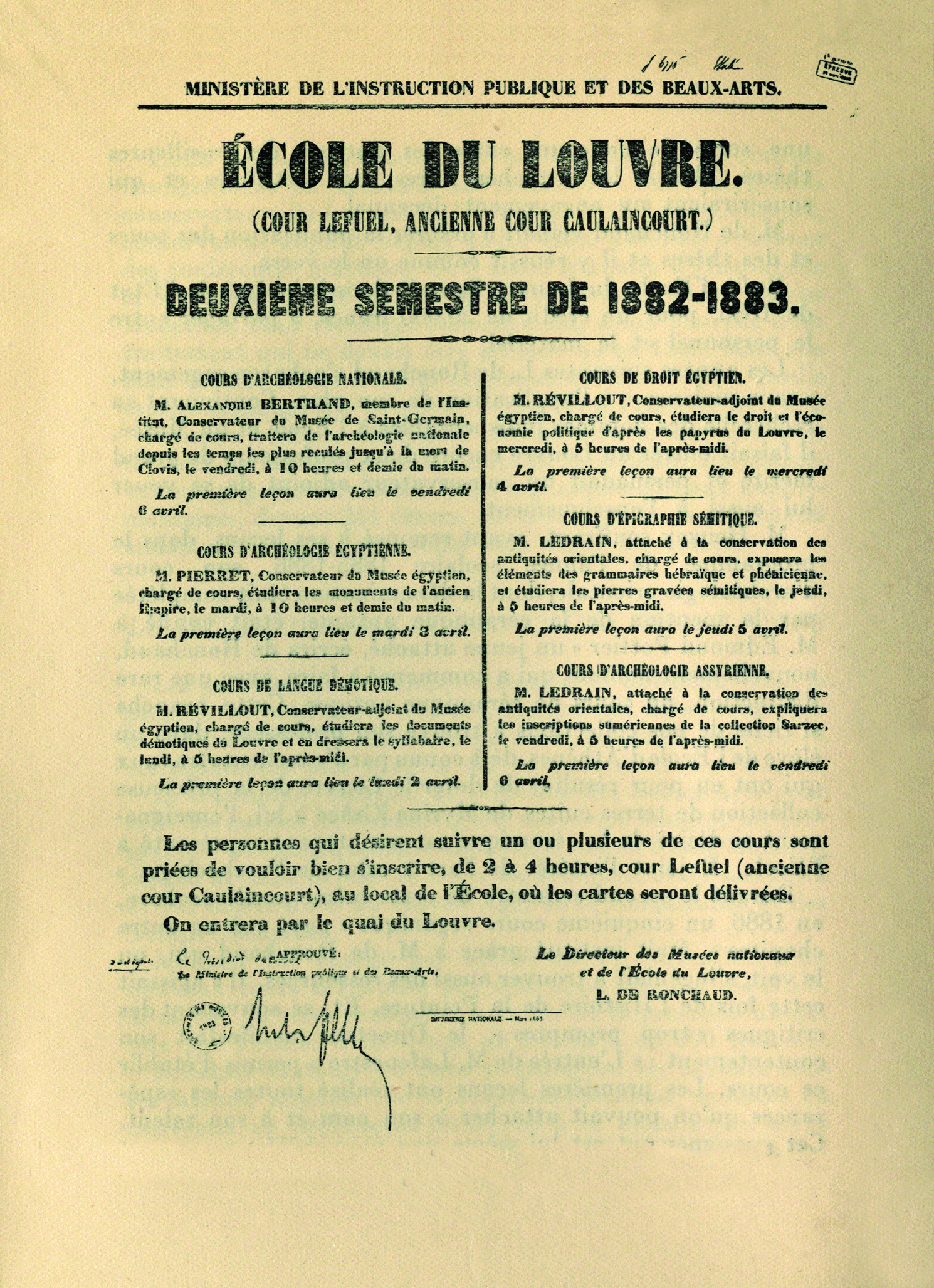 Programme de cours du deuxième semestre de l'année 1882-1883 de l’École du Louvre, avec signature autographe de Jules Ferry